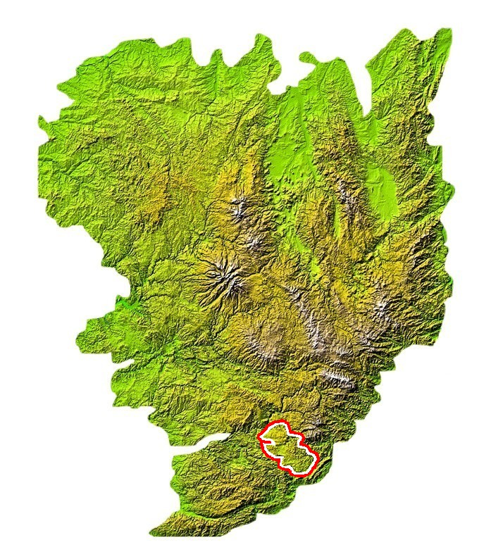 Localisation du causse du Larzac sur la carte du Massif central